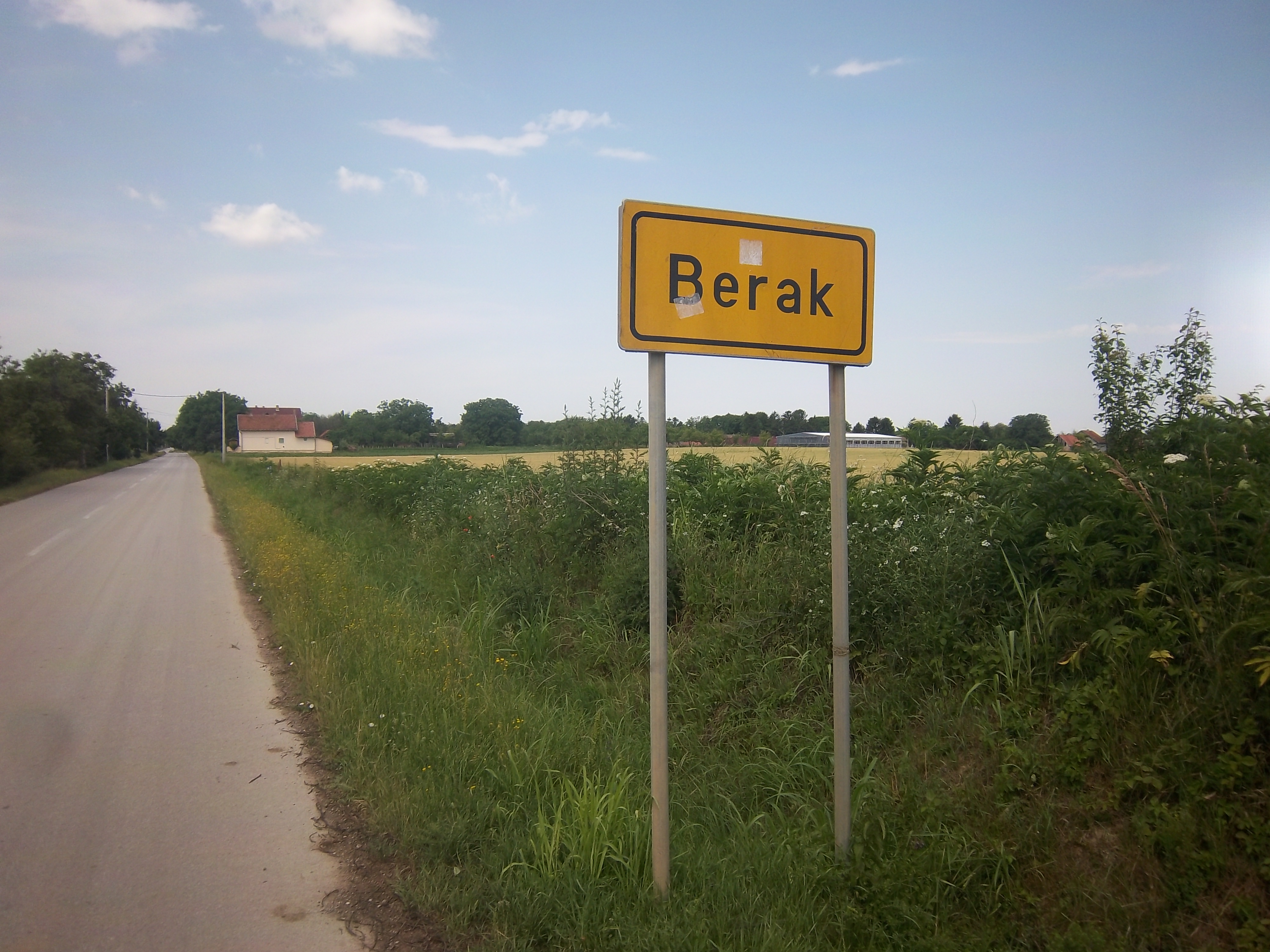 Srpskohrvatski / српскохрватски: Naselje Berak u Općini Tompojevci u Vukovarsko-srijemskoj županiji (Republika Hrvatska).